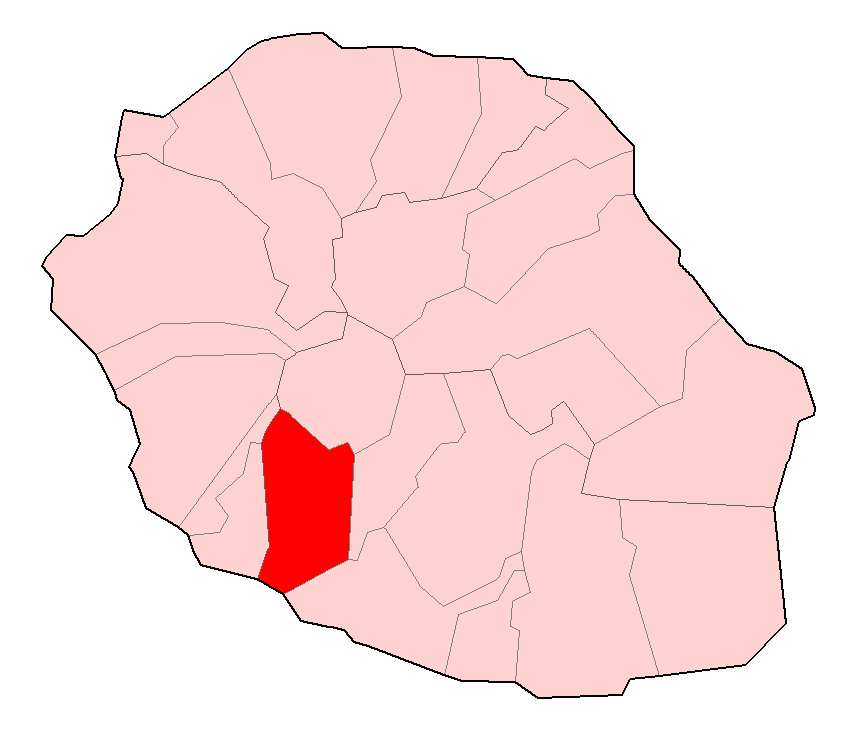 Carte de la Réunion permettant de localiser Saint-Louis.